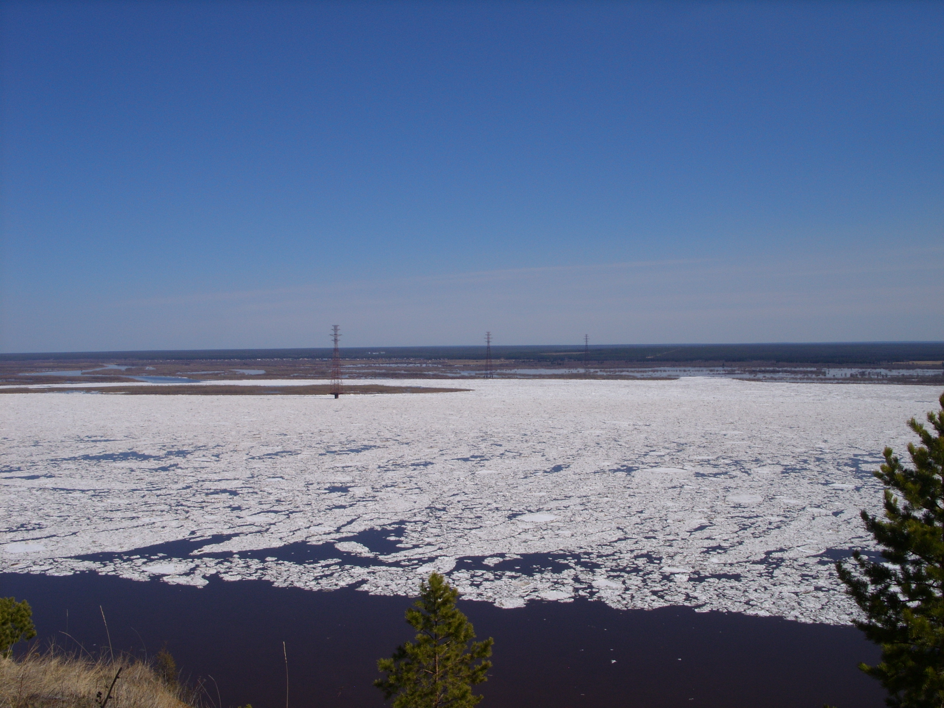 Вид с обзорной площадки Табагинского мыса во время ледохода. Май 2011 г.